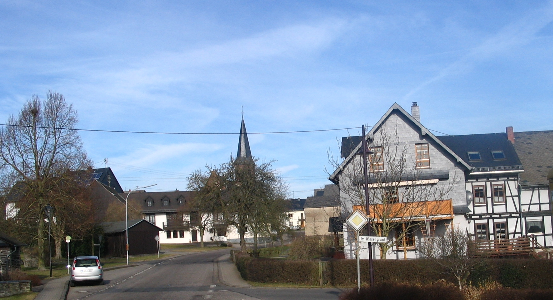 Ortbild Schönborn